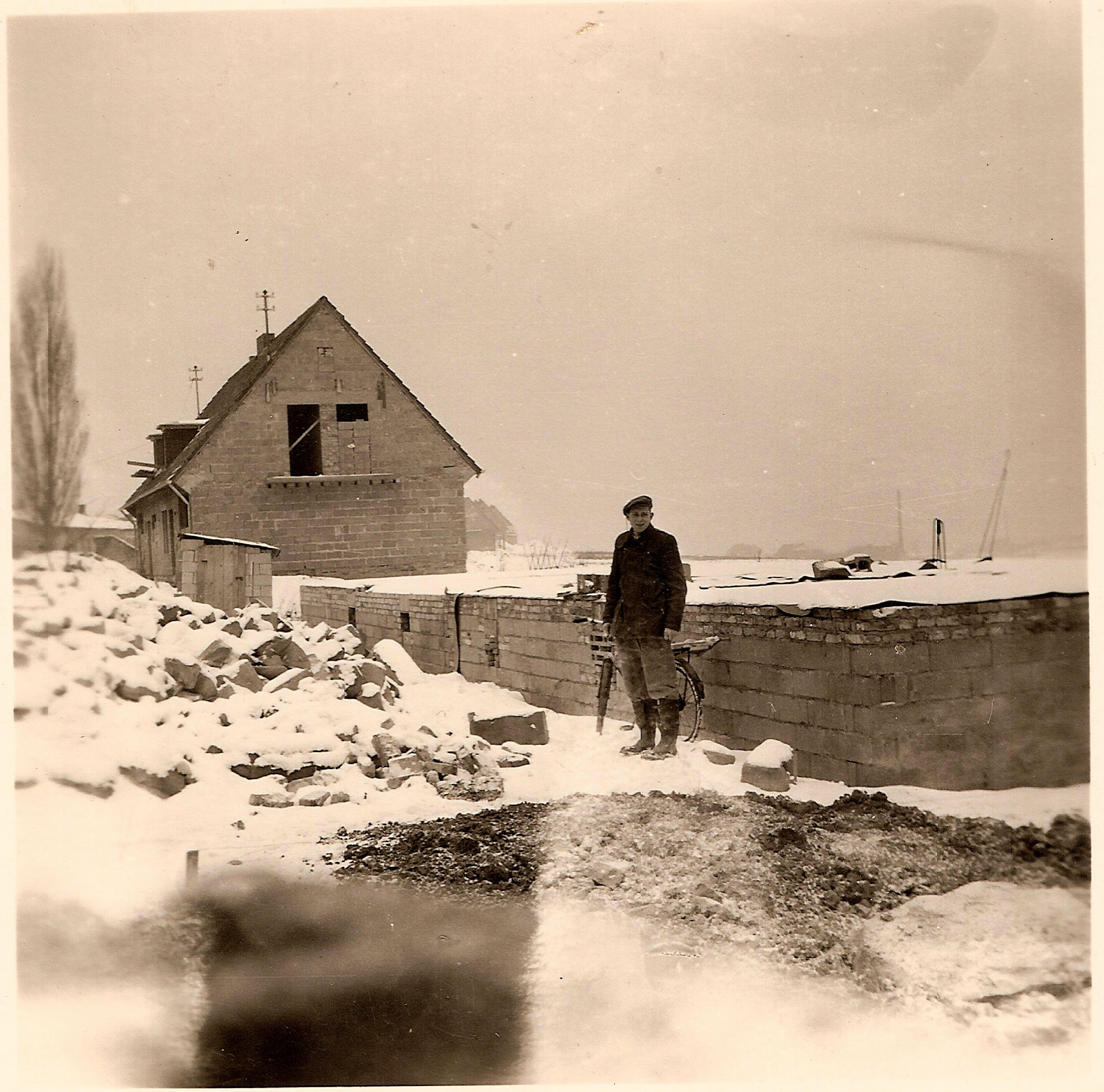 Siedlungsbau in Mainz-Weisenau, Am Großberg